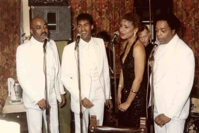 The Platters Golden Hits Revue 1981-1984, Keith Tynes 2.v.l.